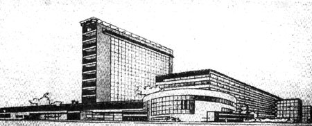 Графический рисунок фасадов выходящих на ул. Энгельса и проспект Ворошиловский проекта Дома советов арх. Илья Голосов